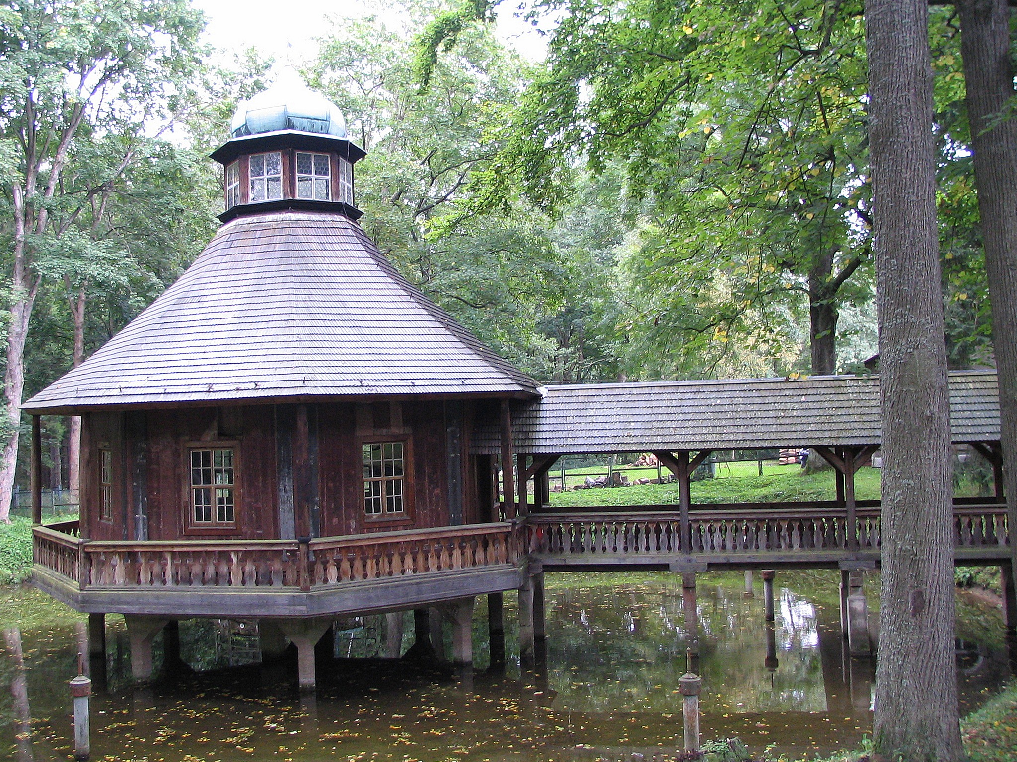 Krzeszów, pawilon opata „Na Wodzie”, drewn., 1730 09.2003.